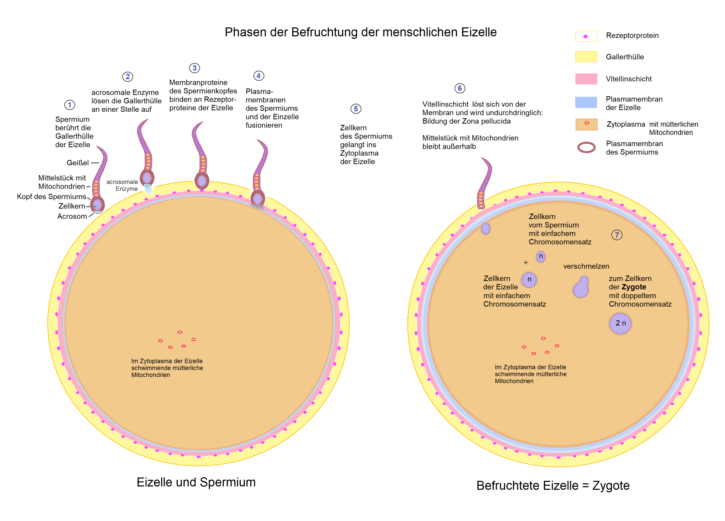 Sieben Phasen der Befruchtung der Eizelle durch ein Spermium